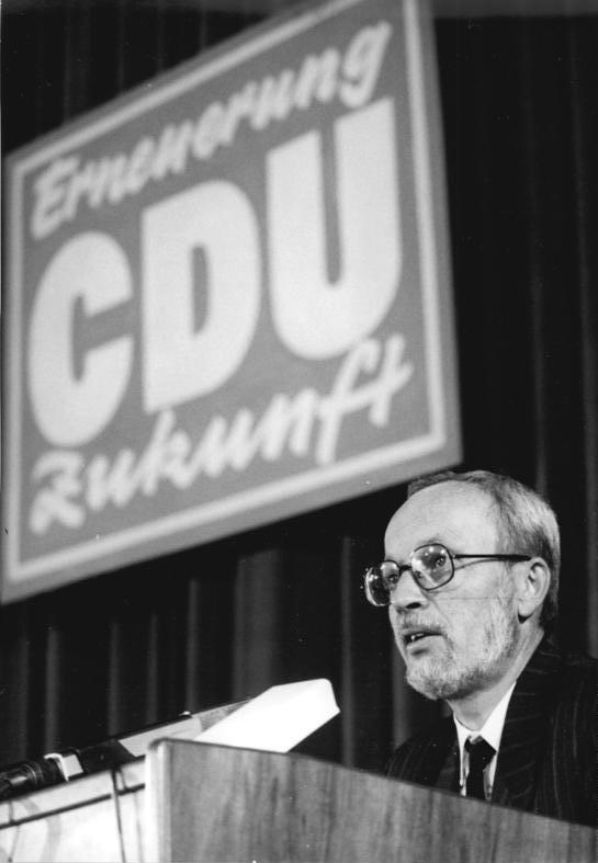 ADN-ZB Reiche-15.12.89-zei-Berlin: CDU-Sonderparteitag - Parteivorsitzender Lothar de Maiziere legte nach der Konstituierung dar, wie sich die CDU den drängenden Aufgaben einer umfassenden Erneuerung der Gesellschaft stellen will.